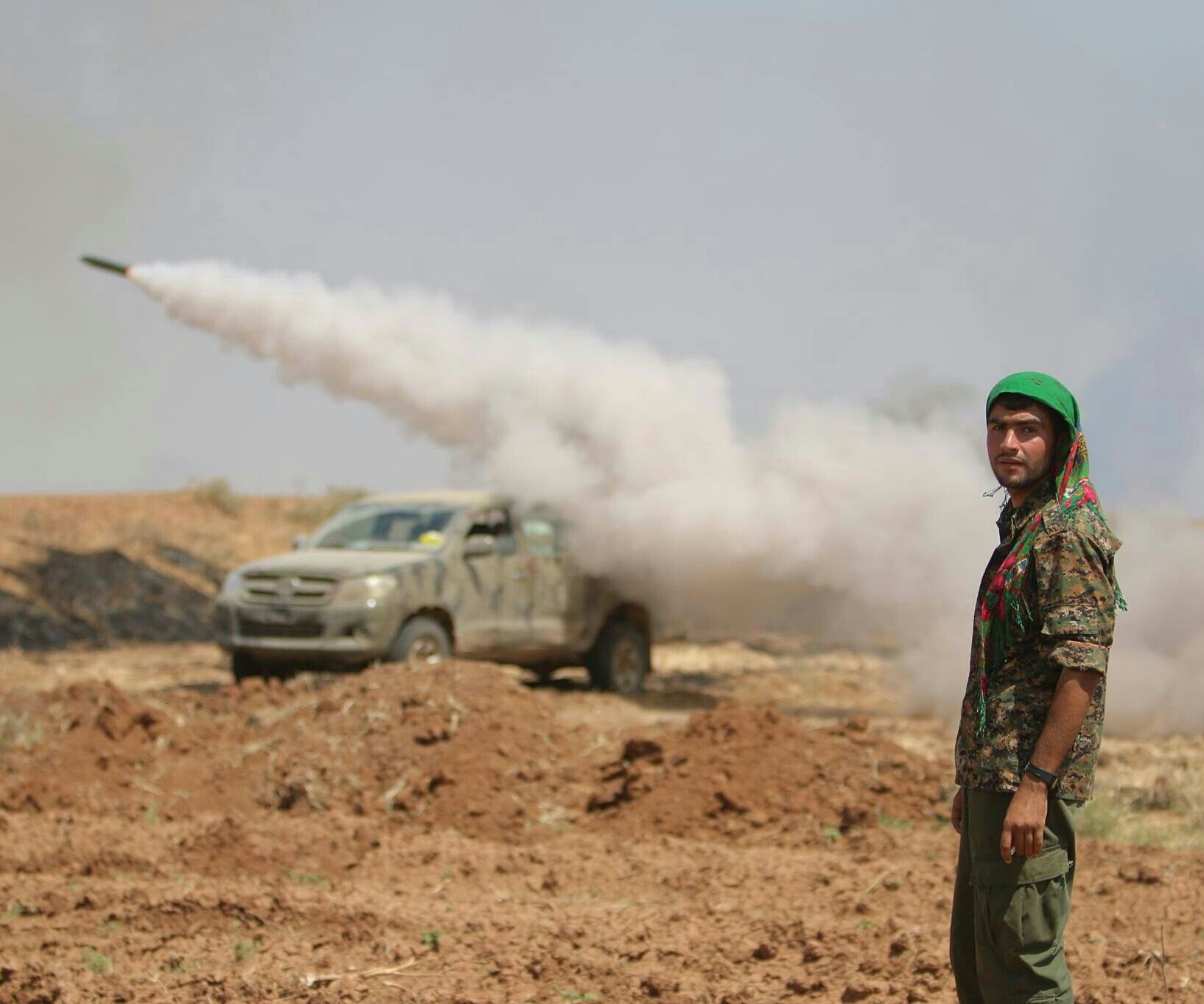 YPG